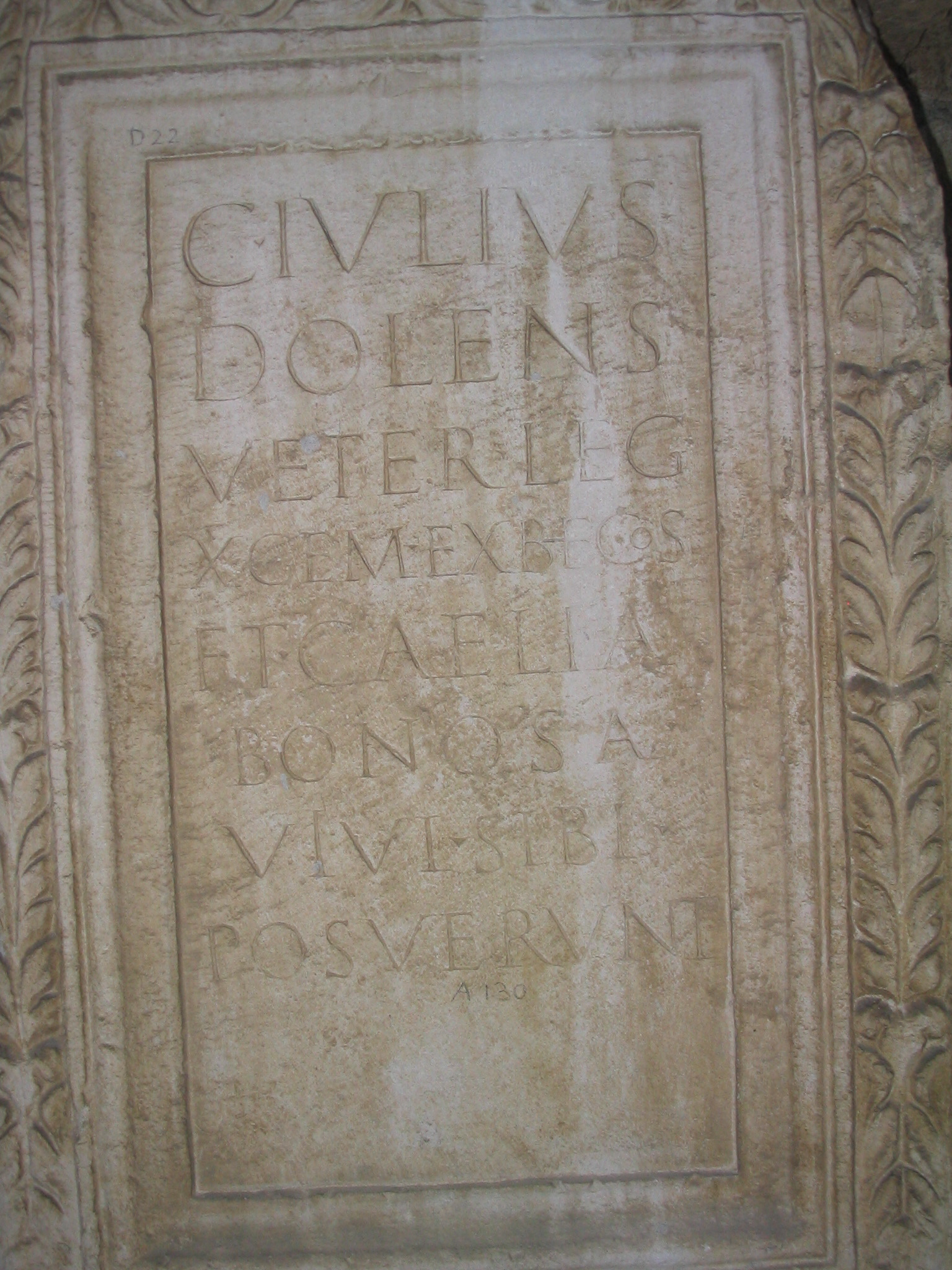 Inscription latine d'époque romaine retrouvée à Salona et conservée au musée de Split. Il s'agit de l'épitaphe du vétéran Caius Iulius Dolens, ancien soldat de la Xème légion Gemina et de sa femme Caelia Bonosa. L'inscription fut faite de leur vivant. Dolens avait atteint le grade de bénéficiaire du gouverneur. Référence : CIL III, 8745